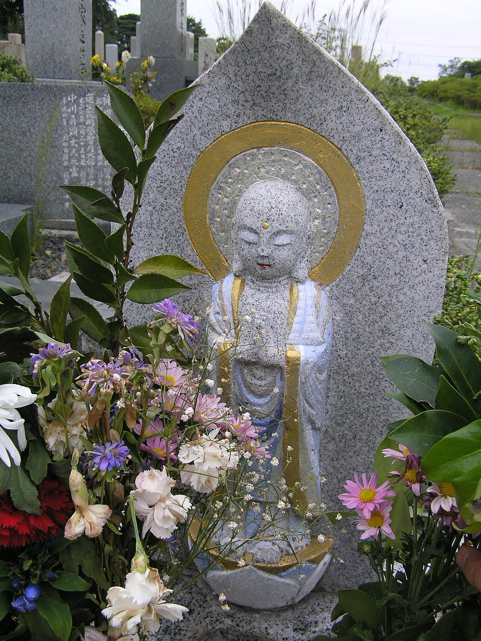 水子地蔵